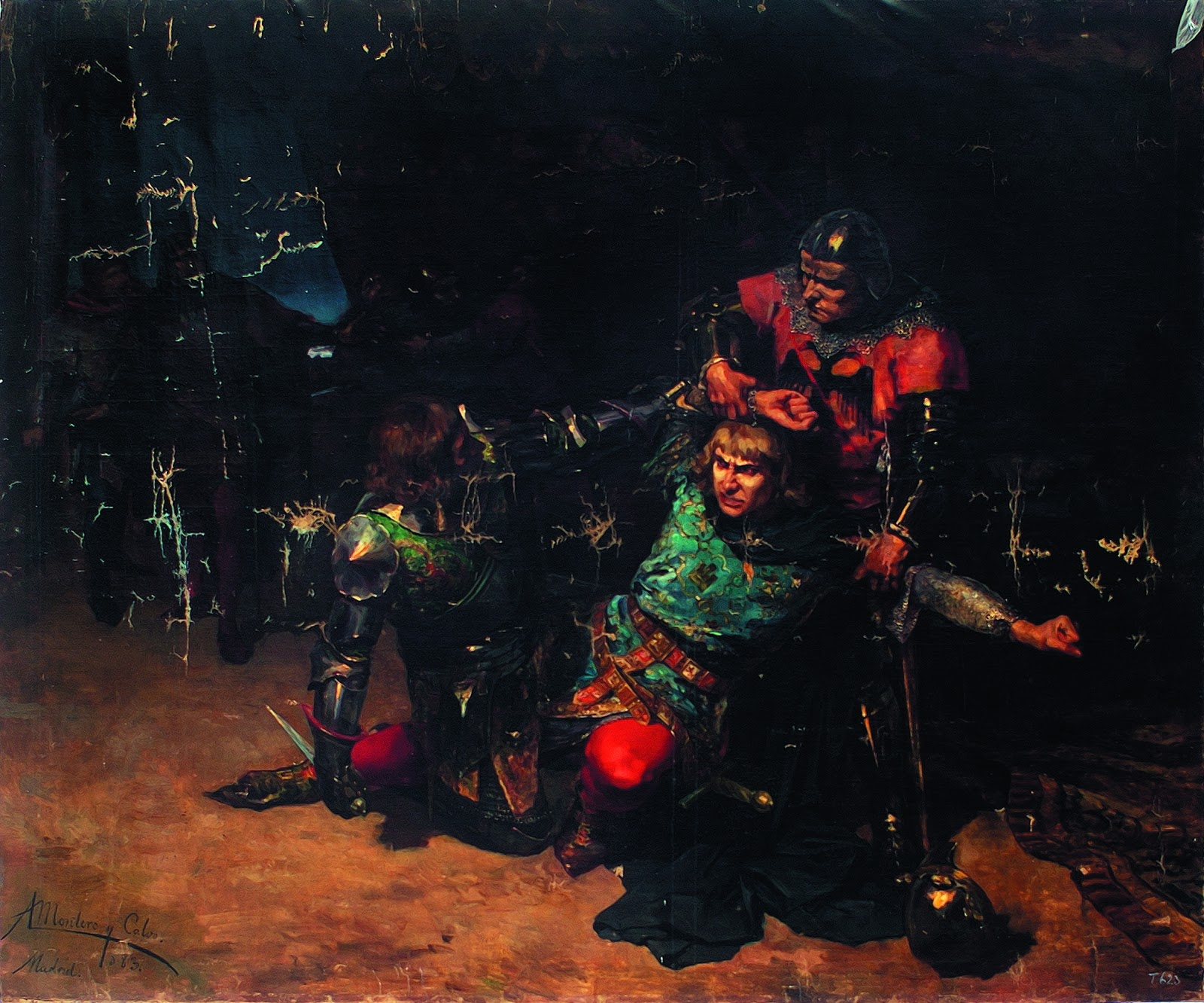 La obra representa el momento en que el rey Pedro I de Castilla (1334-1369), fue asesinado por su hermanastro, Enrique II de Trastámara, y el personaje que aparece en pie y sujetando al rey Pedro I para que su hermano pudiera matarle es el célebre condestable francés Bertrand du Guesclin, que según la tradición en aquella ocasión pronunció la célebre frase: «ni quito ni pongo rey, pero ayudo a mi señor». Este cuadro fue presentado en la Exposición de Bellas Artes de 1884, donde logró la medalla de tercera clase, y fue adquirido por el Estado español y actualmente se halla en la Facultad de Filosofía y Letras de la Universidad de Zaragoza.